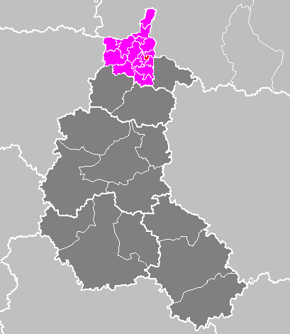 Maps of arrondissements and cantons of France: Arrondissement de Charleville-Mézières - Canton de Charleville-Centre.PNG